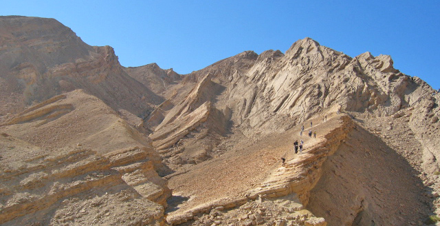 Negev-Wüst